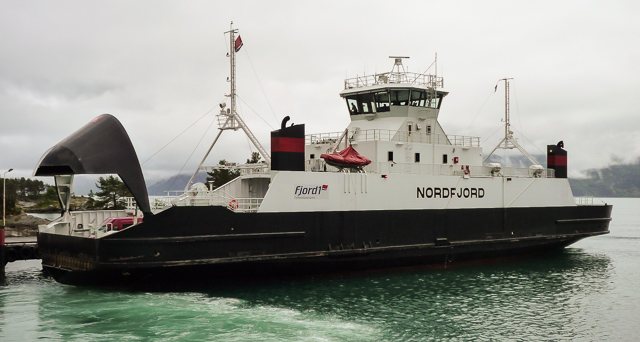 MF Nordfjord ved Rysjedalsvika